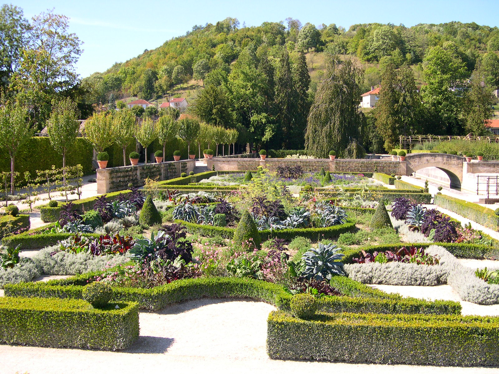 Joinville - Chateau du Grand Jardin - parc d'inspiration Renaissance